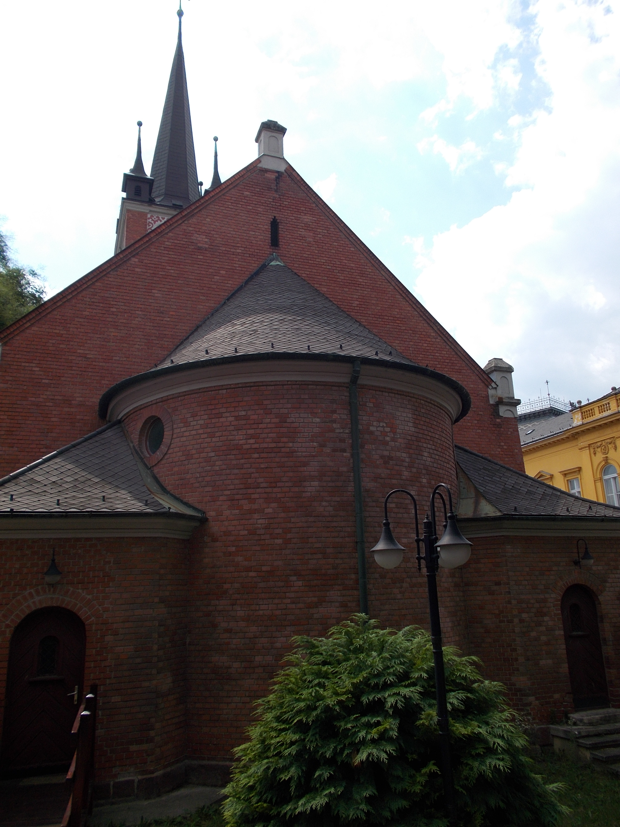 Evangélikus templom az Evangélikus Közösségi Ház udvara felől. Műemlék ID 3893. Modern stílus, épült 1930-ban. Tervező Sándy Gyula. - Magyarország, Fejér megye, Székesfehérvár, Víziváros, Szegfű Gyula utca 1